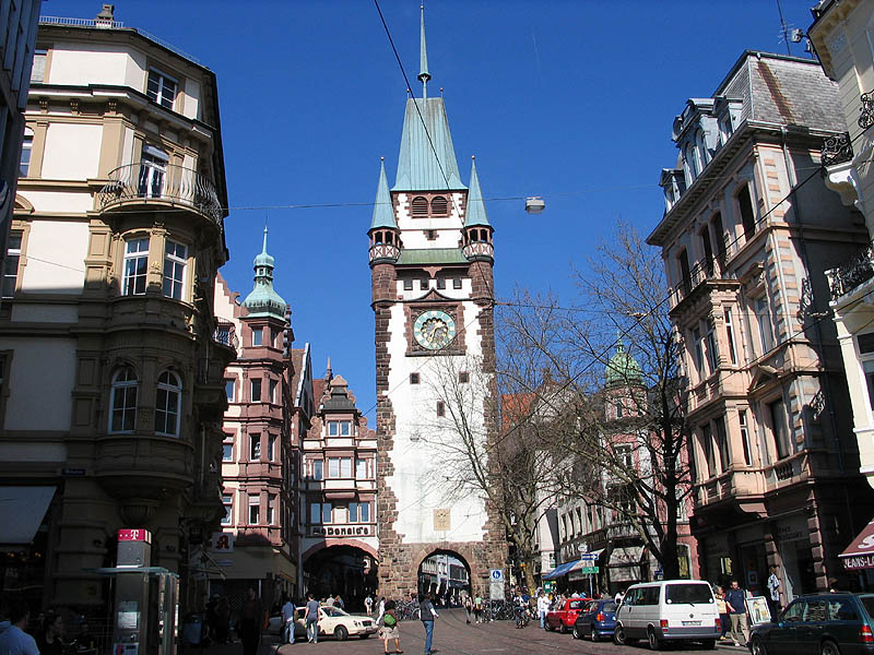 Martinstor, Freiburg im Breisgau, Deutschland